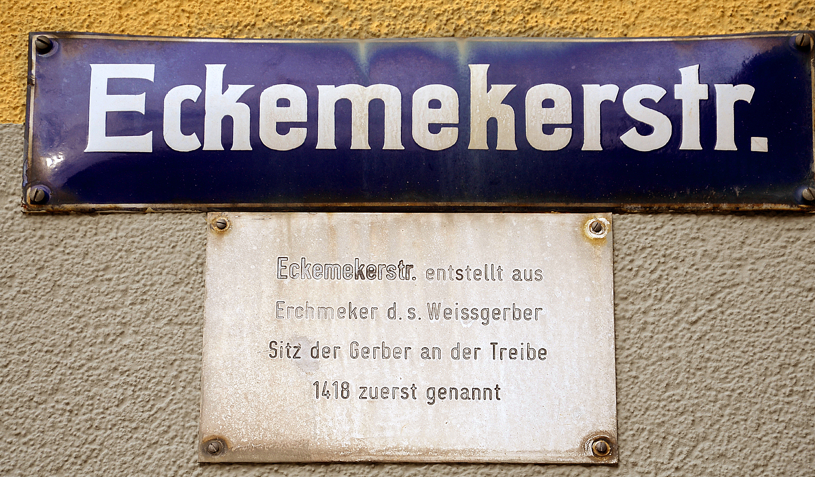 Ein Straßenschild der Eckemekerstraße in Hildesheim mit einer an einer Hauswand gesondert angebrachten Legendentafel. Erläutert werden soll so, etwas schwer "lesbar", dass das Wort Eckemeker sich von dem Begriff Erchmeker' ableitete', dem Wort für Weissgerber, die in Verbindung mit dem Ort offensichtlich im Jahr 1418 so erstmals erwähnt wurden. Wohl auch andere Gerber hatten ihren Wohn- und Arbeitssitz im Mittelalter an dem Treibe genannten Bach ...